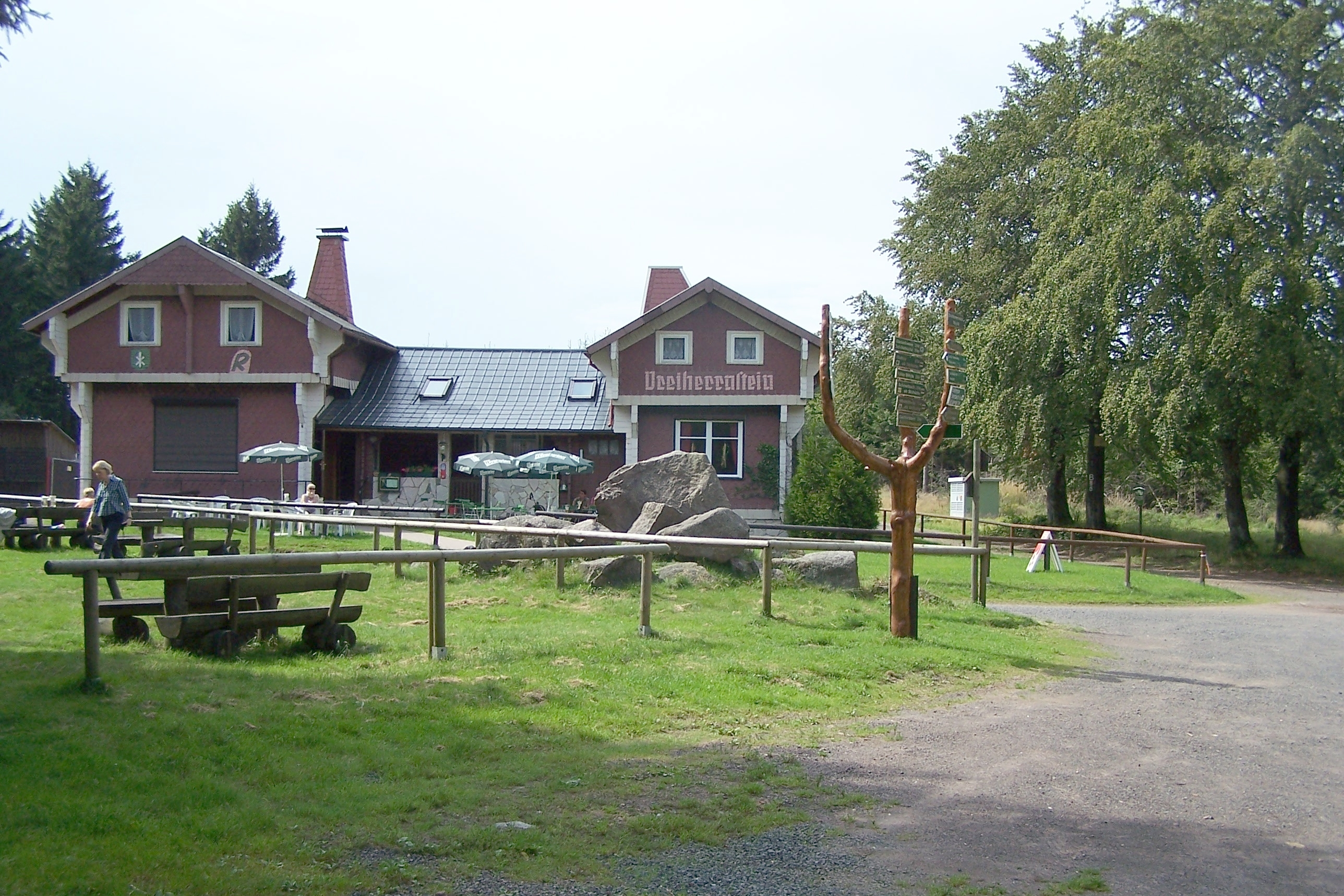 Dreiherrenstein am Großen Weißenberg mit Waldschänke